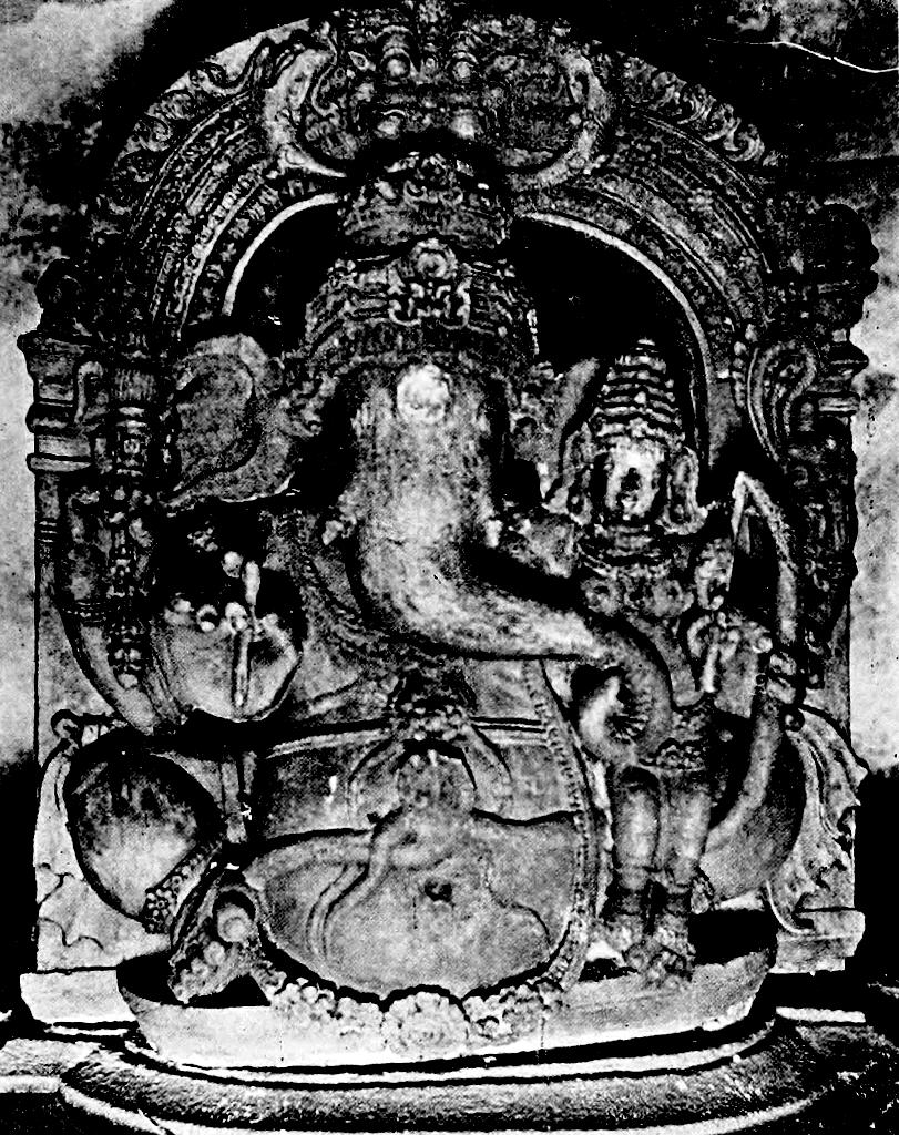 Uchchhishta Ganapati, Nanjangud